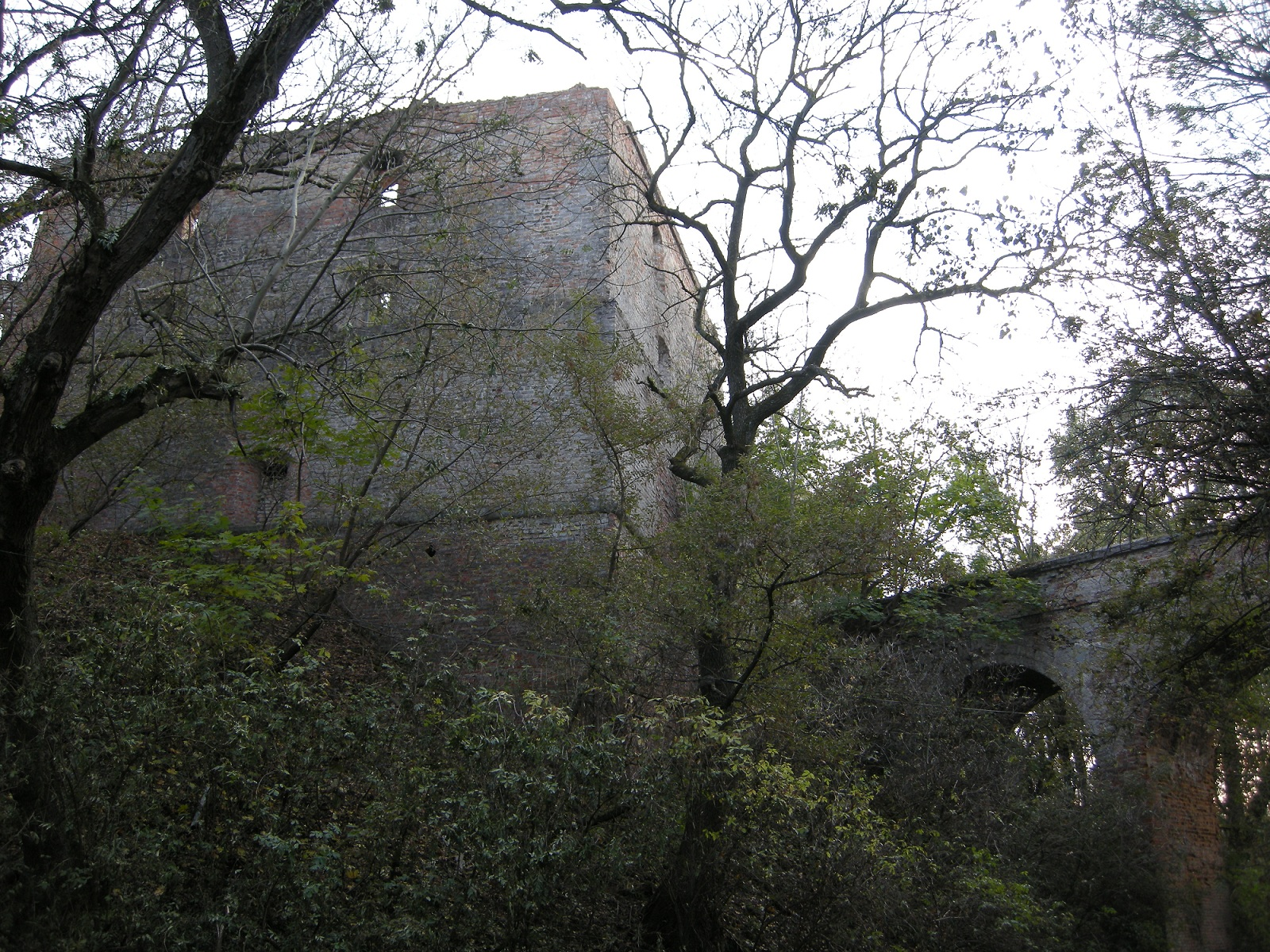 Клеванський замок.